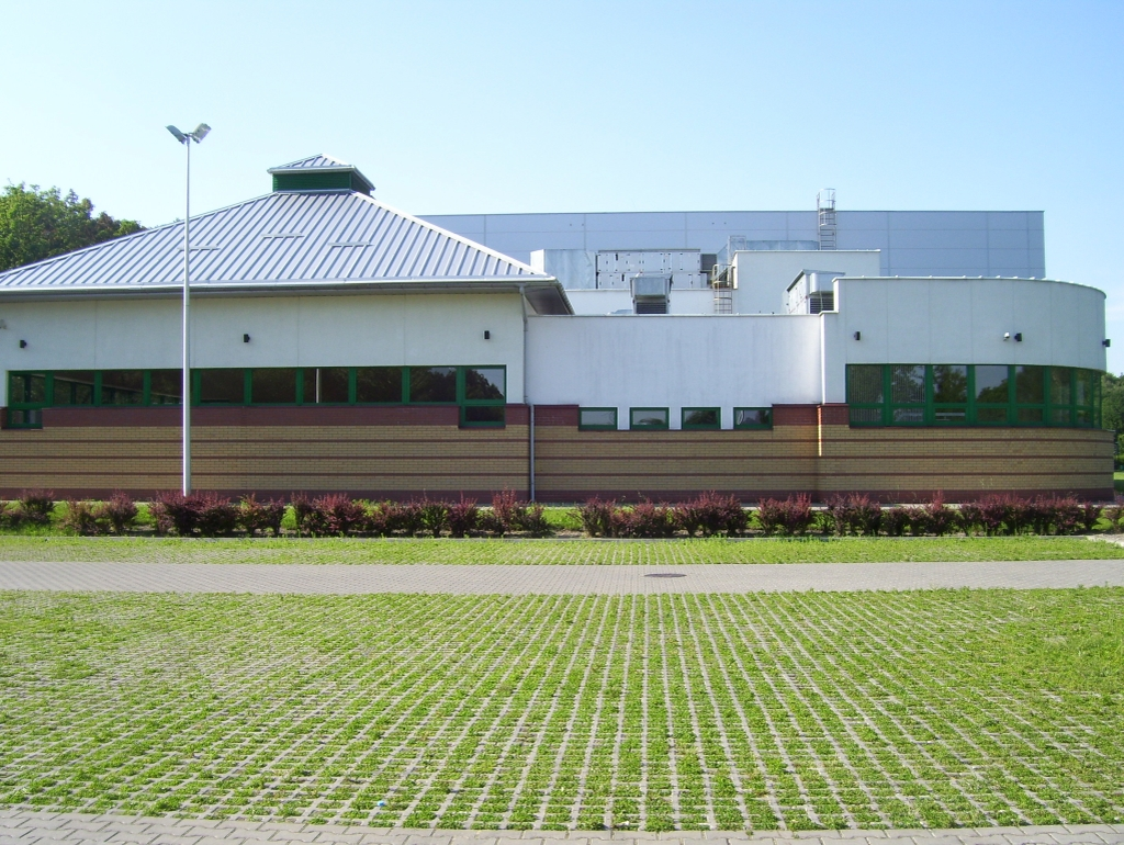 Hala sportowa (na granicy z parkiem Baden Powella). Centrum Sportu i Rekreacji w Łodzi. Hala sportowa (na granicy z parkiem 3 Maja).